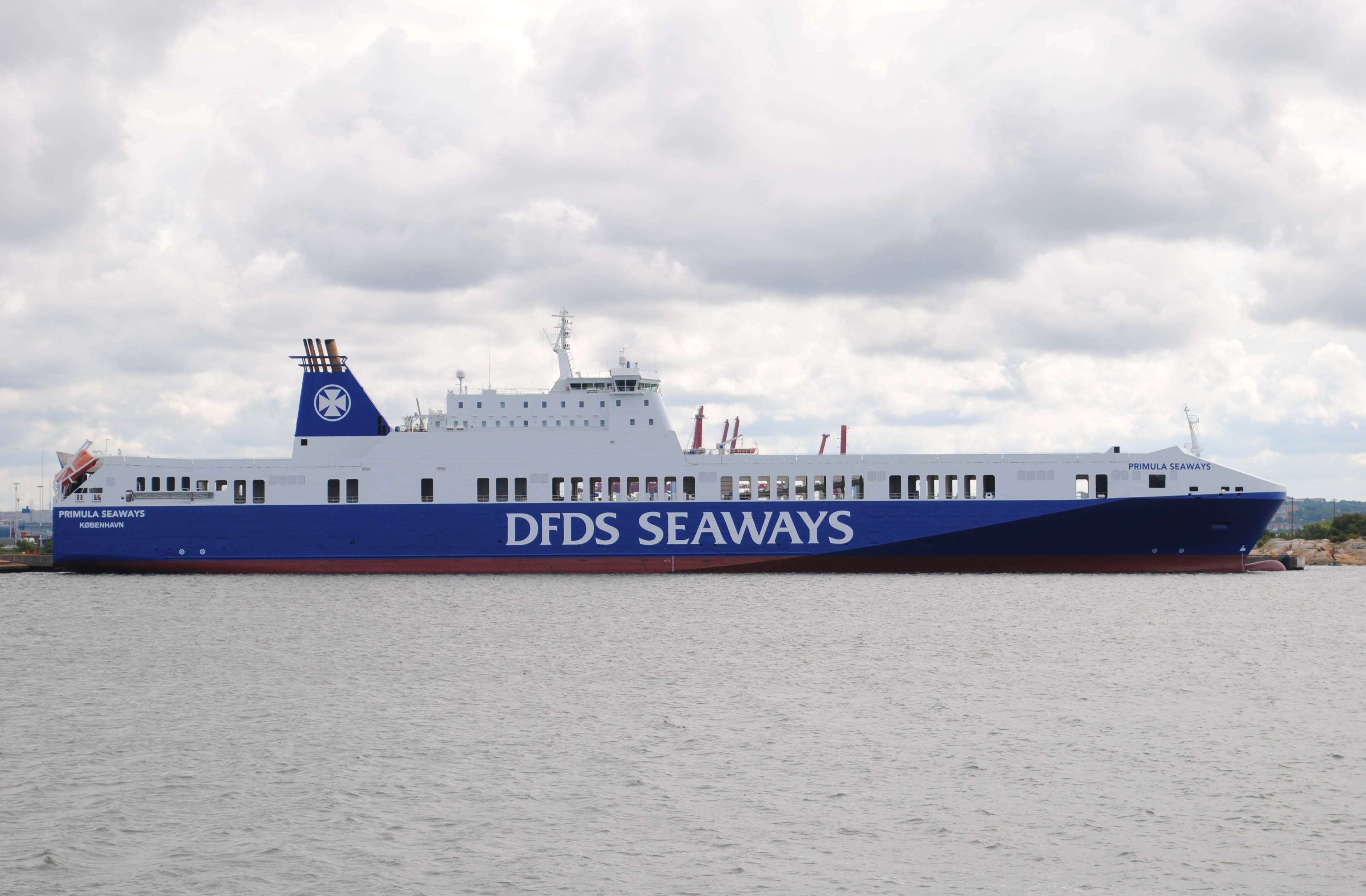 Primula Seaways vid Arendal Göteborg.